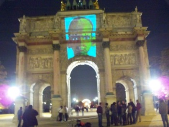 Projection sur l'arc de triomphe du carrousel du louvre d'un autoportrait de Arnaud Prinstet durant la nuit blanche 2007